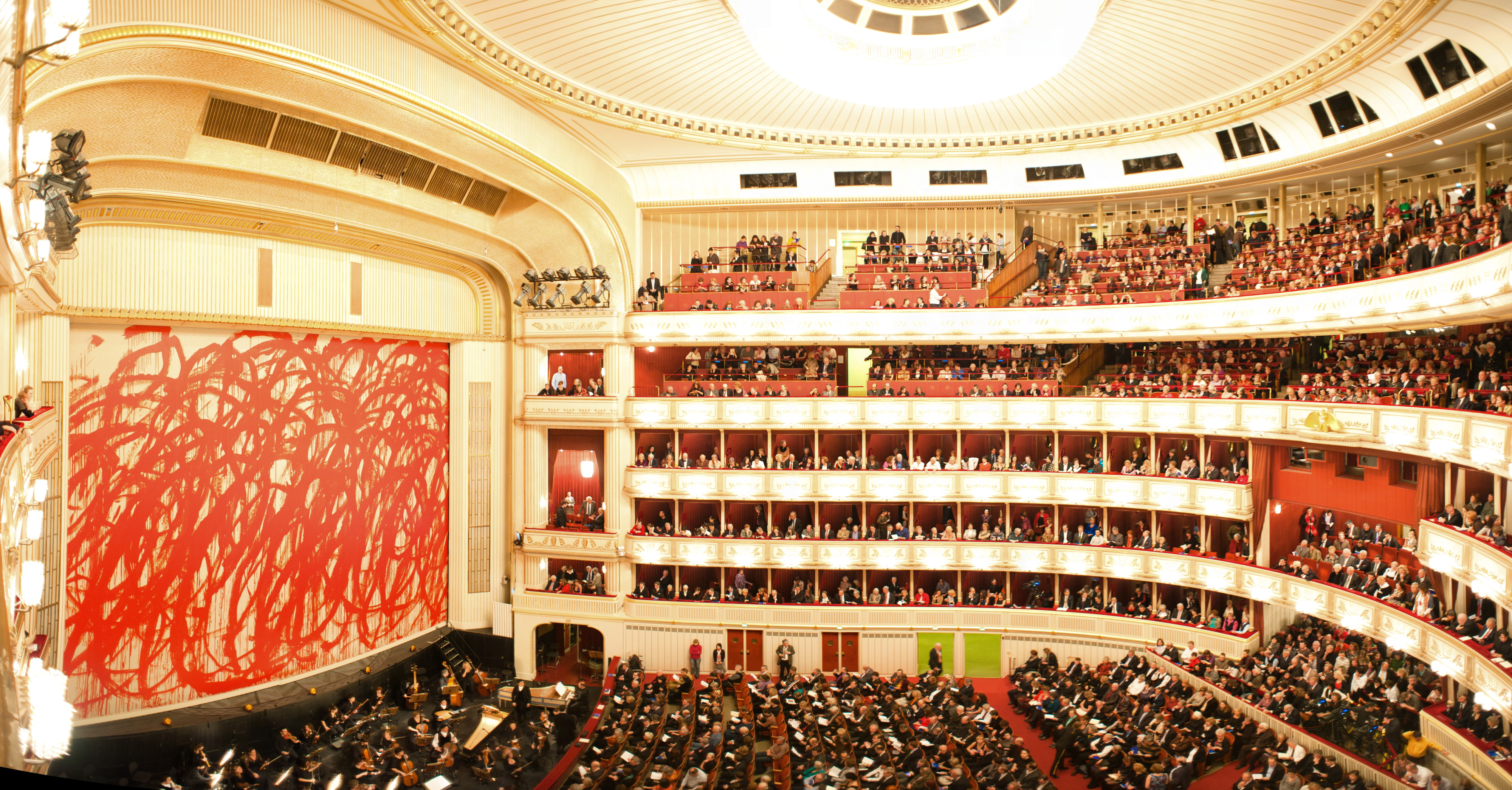 The Vienna State Opera (Wiener Staatsoper) interior. Vienna, Austria, Western Europe.